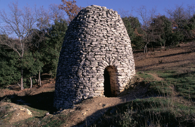 Cabane en pierre sèche à voûte d'encorbellement sur plan circulaire à Bonnieux (Vaucluse]. Auteur : Dominique Repérant.